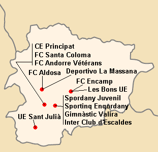 Répartition des clubs en Divisio 1A 1996-1997.